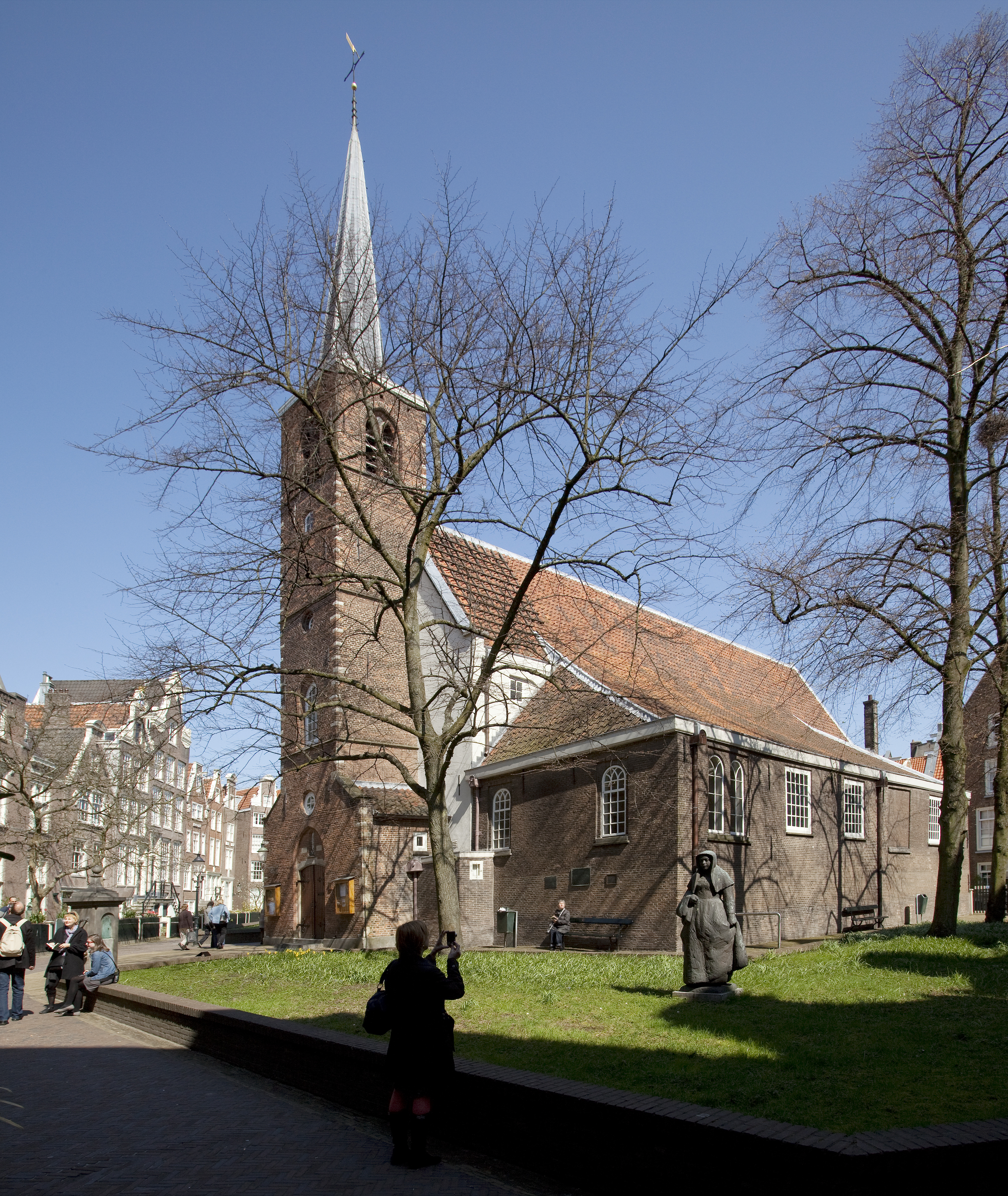 Engelse kerk: Overzicht westgevel en zuidgevel